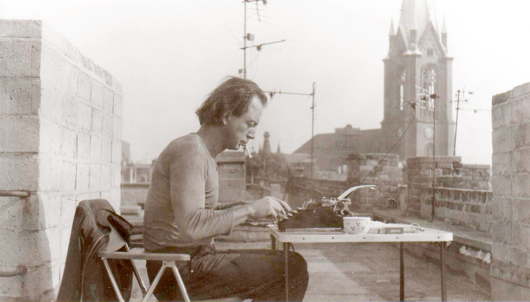 Wilfried Bergholz schreibend auf dem Dach